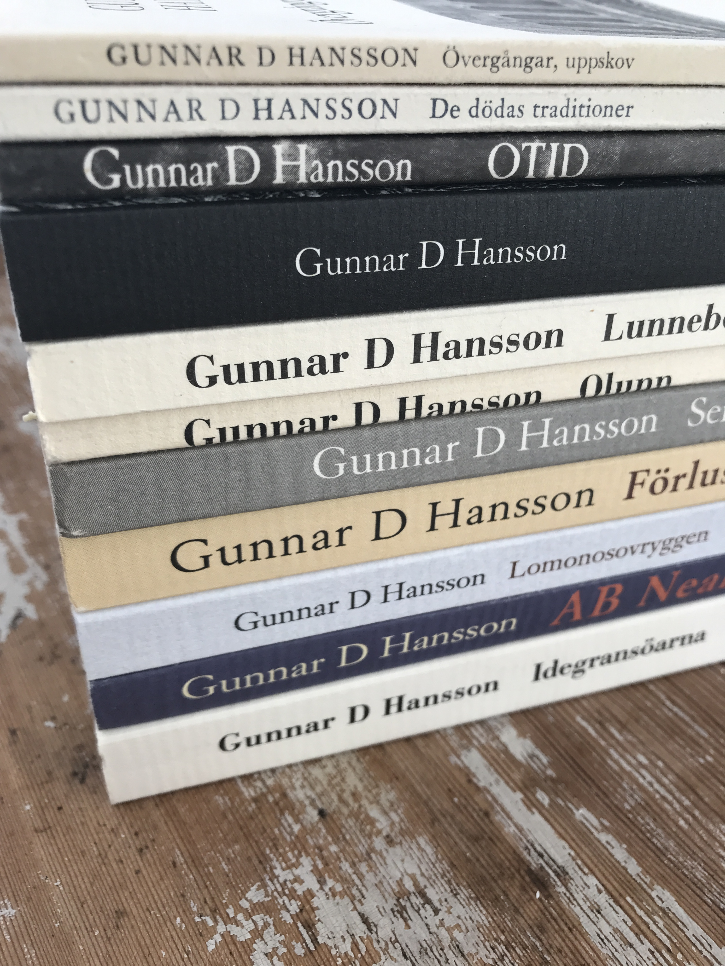 Ett större urval bokryggar ur Gunnar D Hanssons produktion.